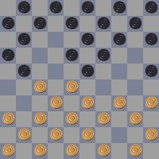 Zelfgemaakt diagrammetje